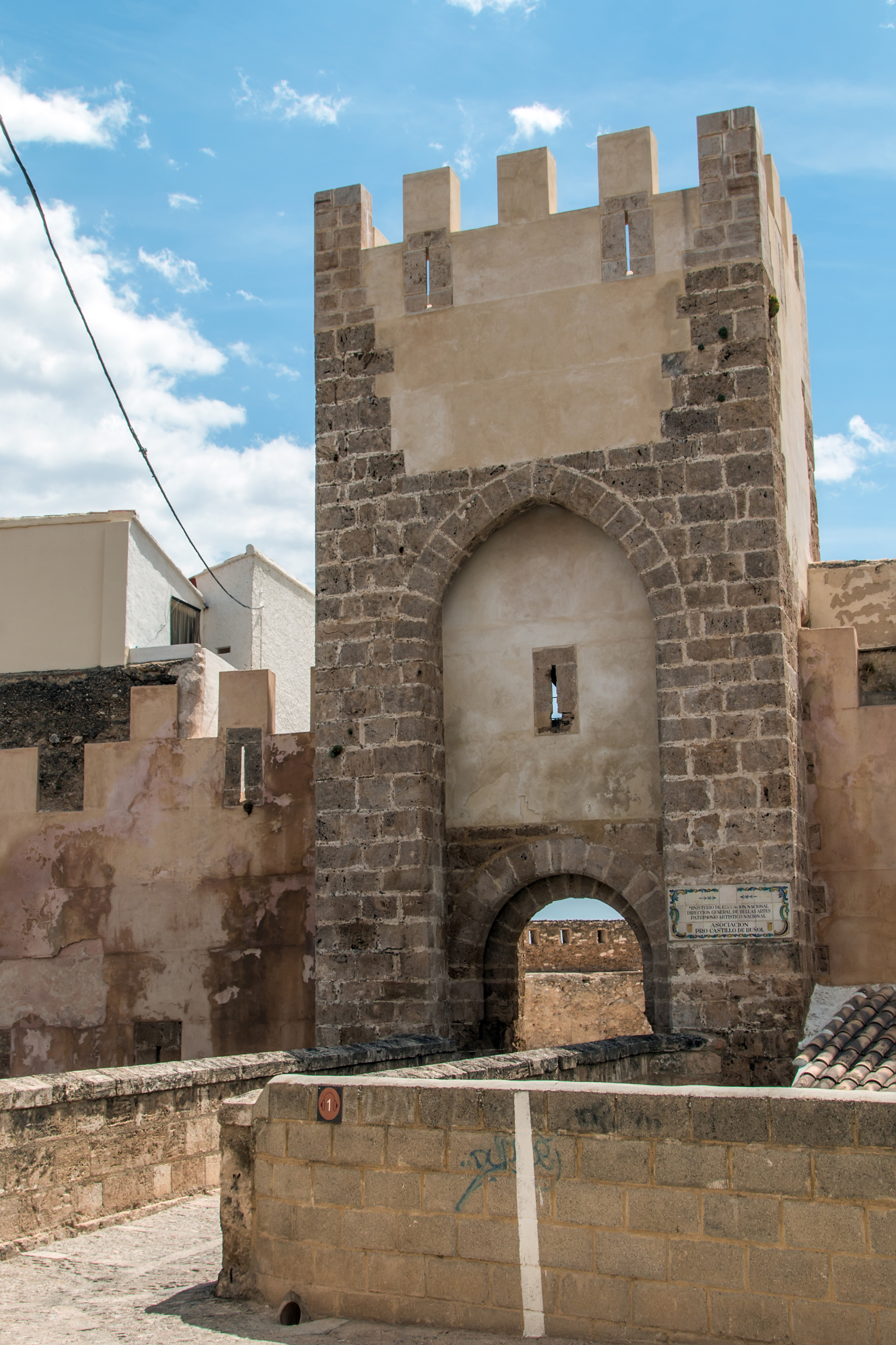 Замок Буньоль. Северная башня.